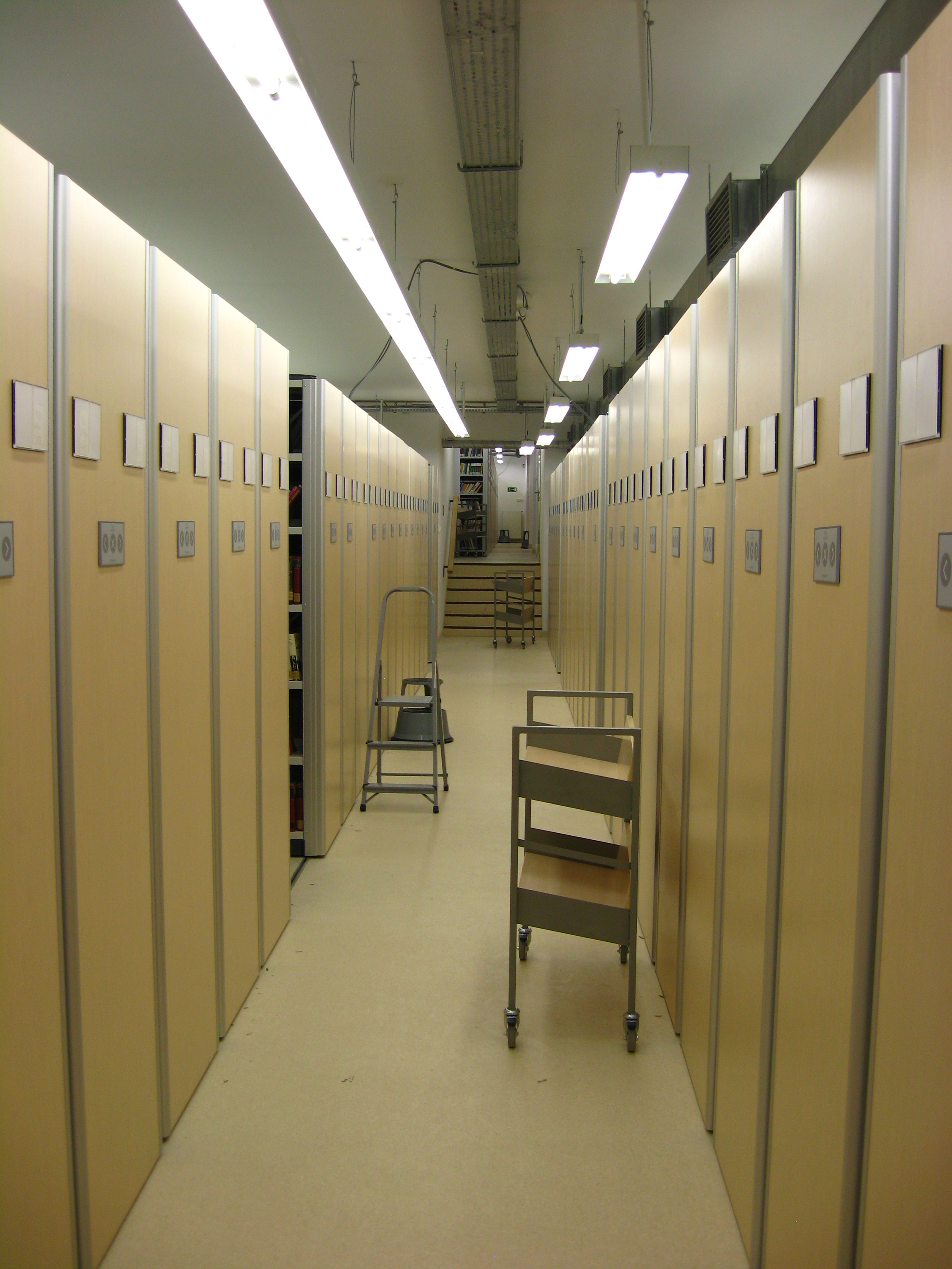 Magazyn w budynku wzniesionym w latach 2010-2011.